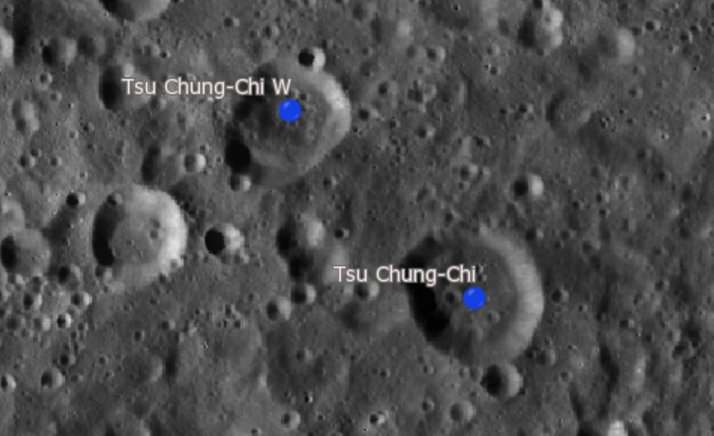 Cráter lunar Tsu Chung-Chi. Cráteres satélite. (Imagen LRO)